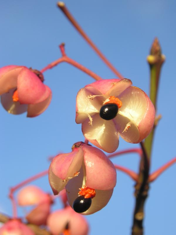 Fusain d'Europe au parc floral de Paris